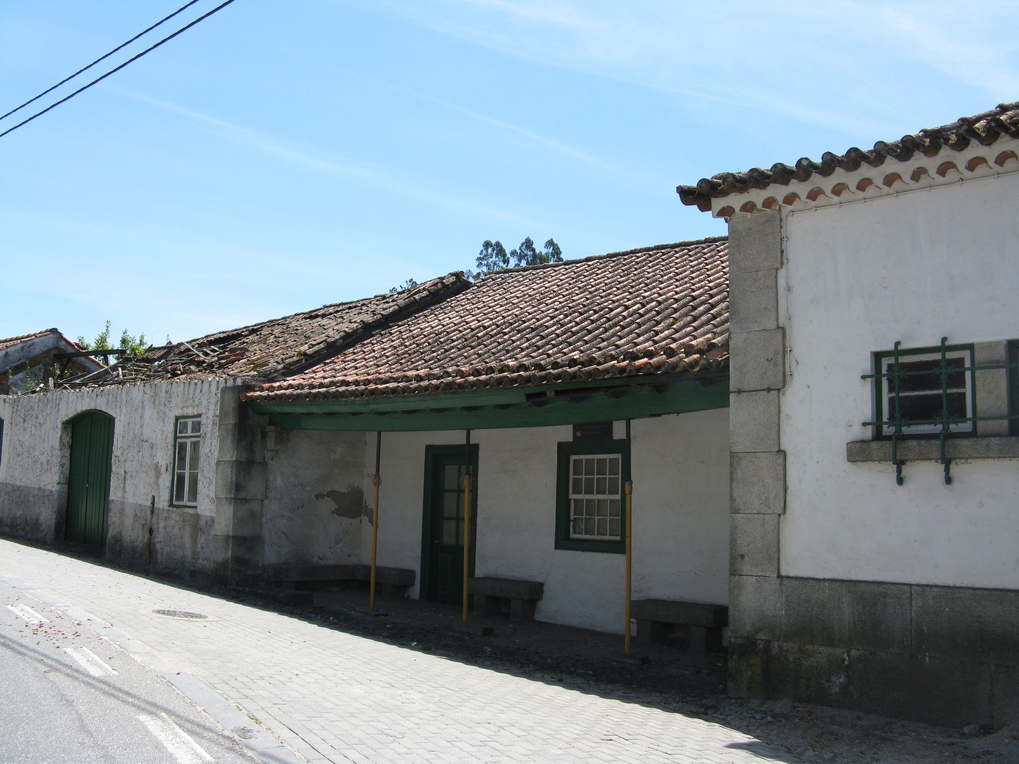 The house where António de Oliveira Salazar was born